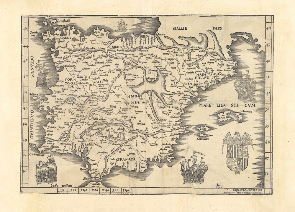 Mapa moderno ("tabula nova") de la península Ibérica publicado en 1499. Reproducido de un ejemplar conservado en el Archivo Histórico Municipal de Mérida. La toponimia está en latín y en italiano. El escudo de armas es el de los Reyes Católicos pero con la peculiaridad de mostrar las armas de Aragón-Sicilia y Castilla-León invertidas respecto a la representación más habitual. Fuente: Carmen Manso Porto, "El mapa de España en época de los Reyes Católicos", Revista de Estudios Colombinos, 11, junio 2015.